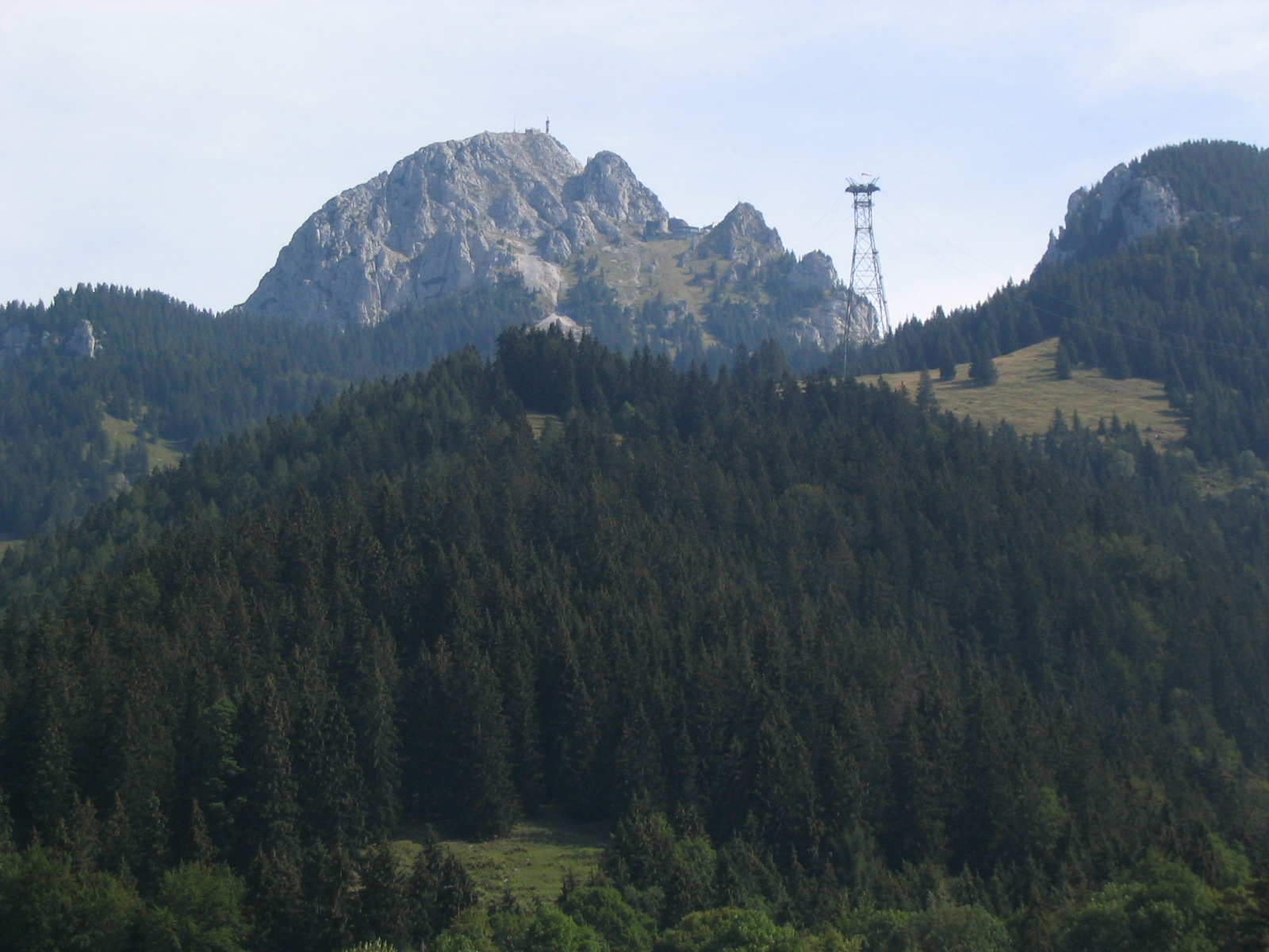 Stützpfeiler der Seilbahn zum Wendelstein